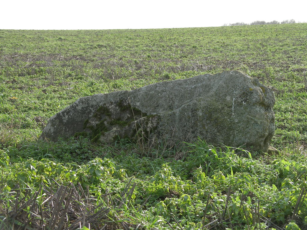 Mégalithe classé